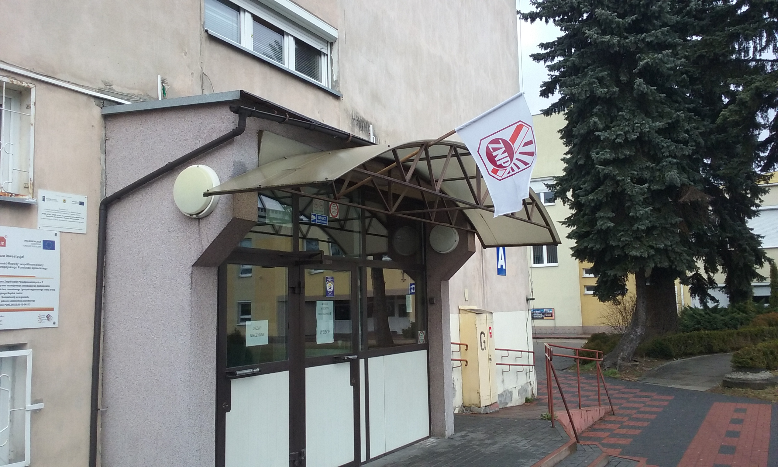 Flaga ZNP (Związek Nauczycielstwa Polskiego) przed wejśćiem do budynku ZSP2 (Gastronomik) w Tomaszowie Mazowieckim w województwie łódzkim